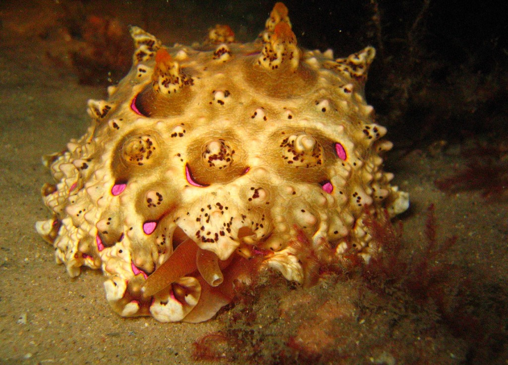 Mamillate Pleurobranch (Pleurobranchus mamillatus). Fly Point, Port Stephens, NSW